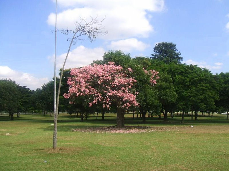 Bosque no Parque do Ibirapuera, São Paulo, Brasil.